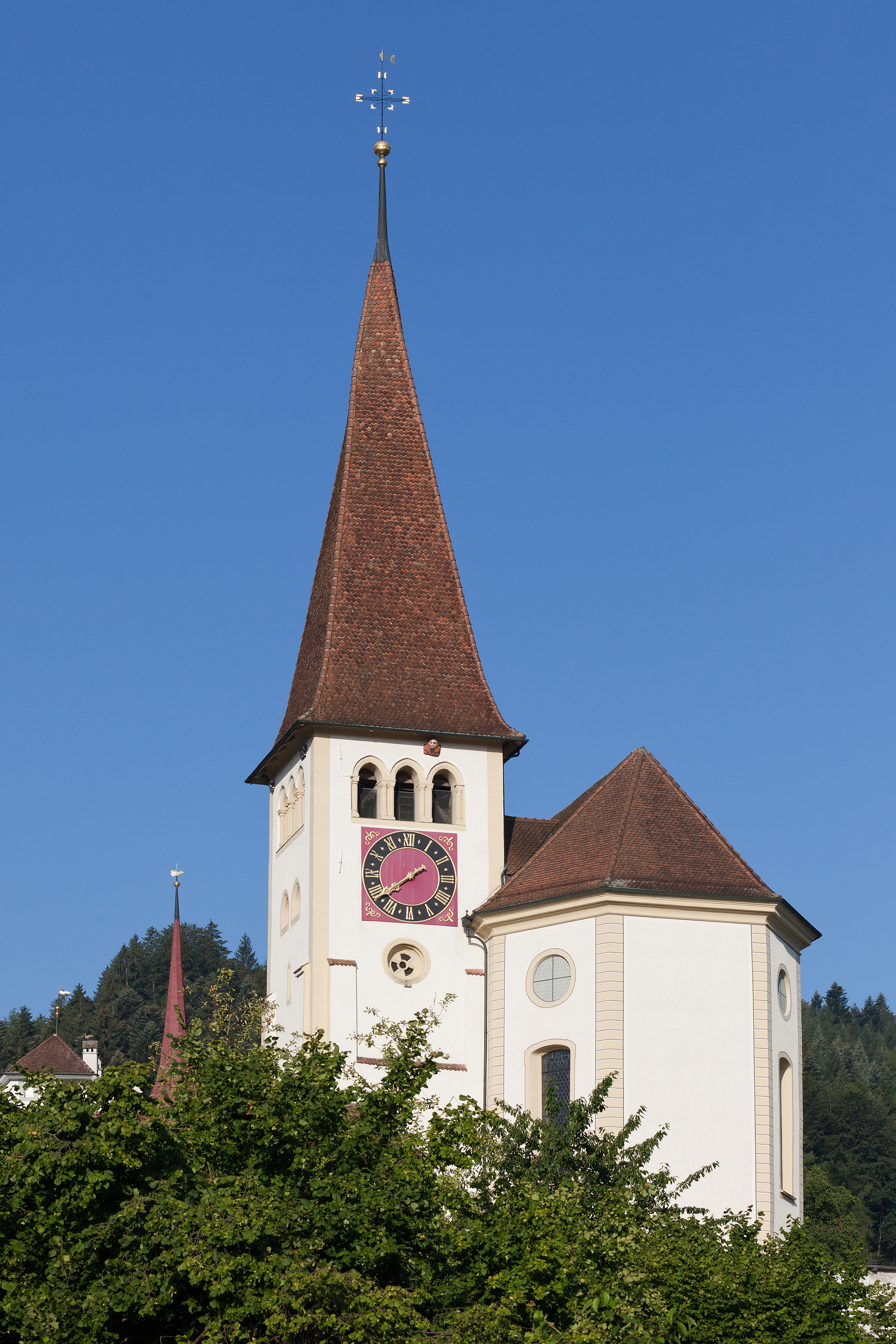 Katholische Kirche St. Martin in Altishofen (LU)